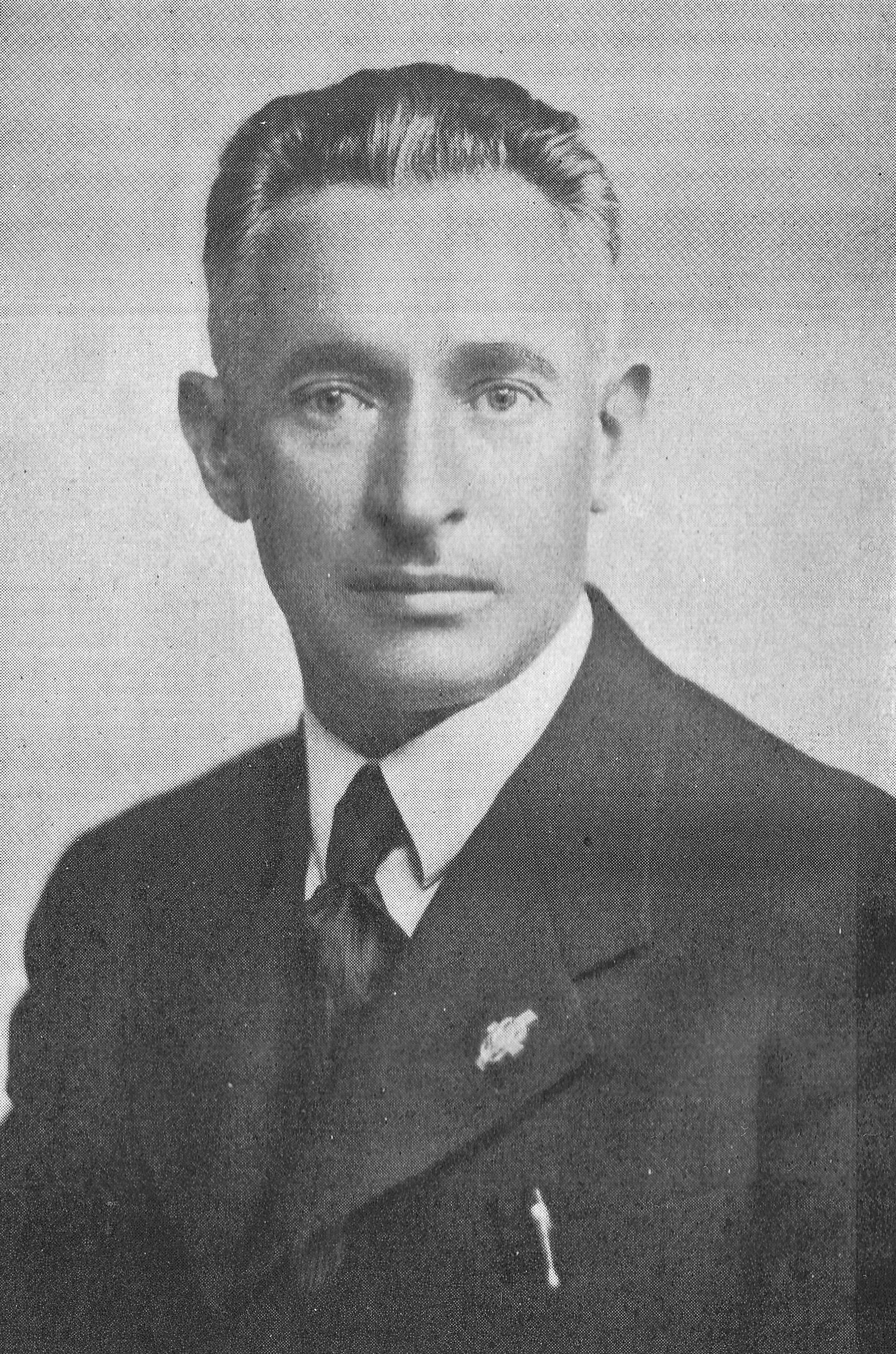 Józef Poliński